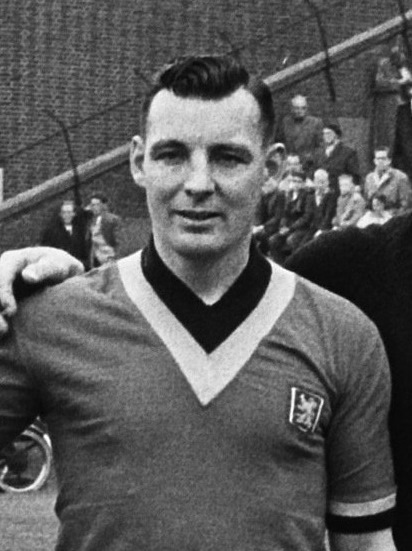 Léon Aernaudts